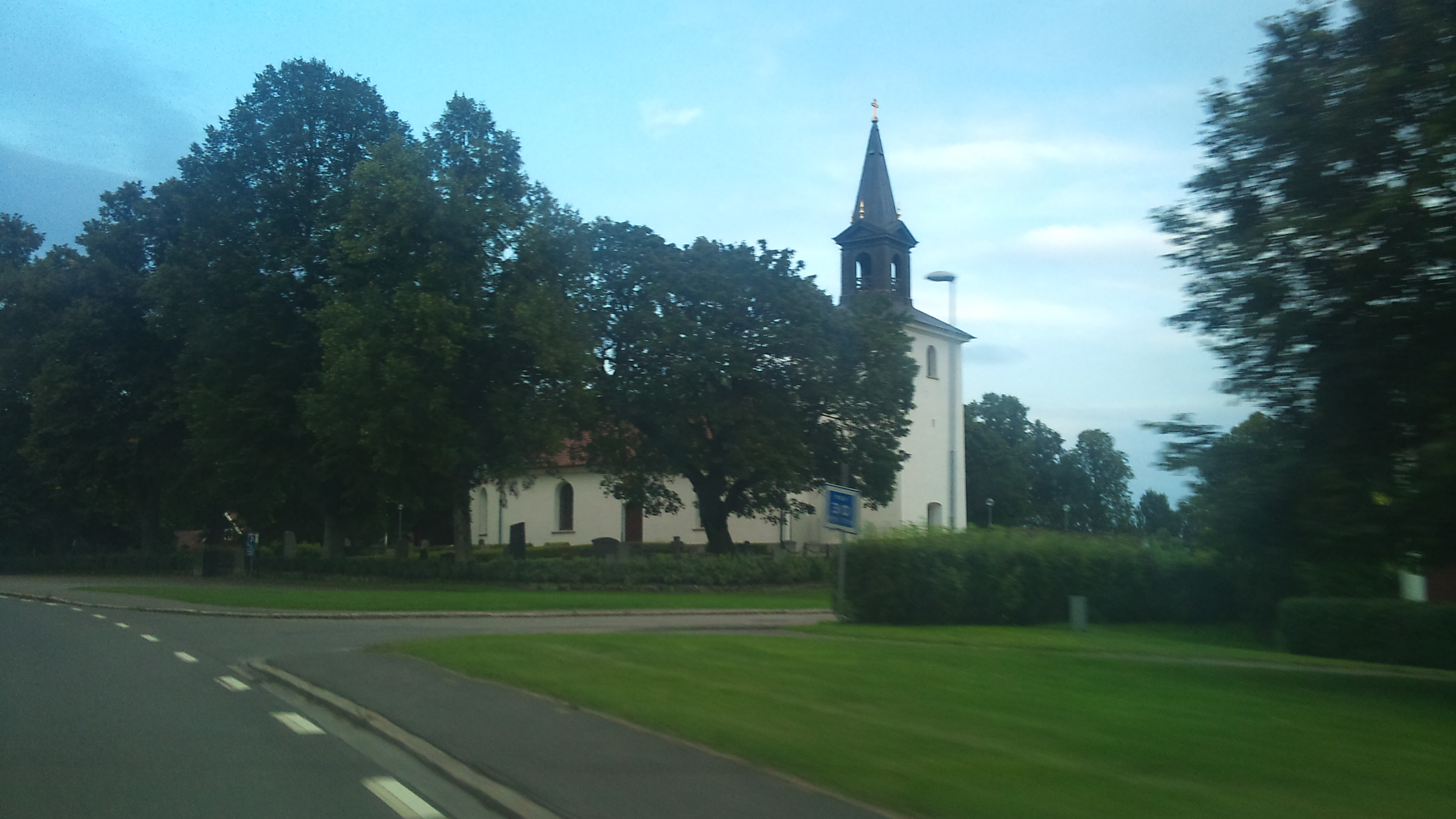 Kyrkan i Väring